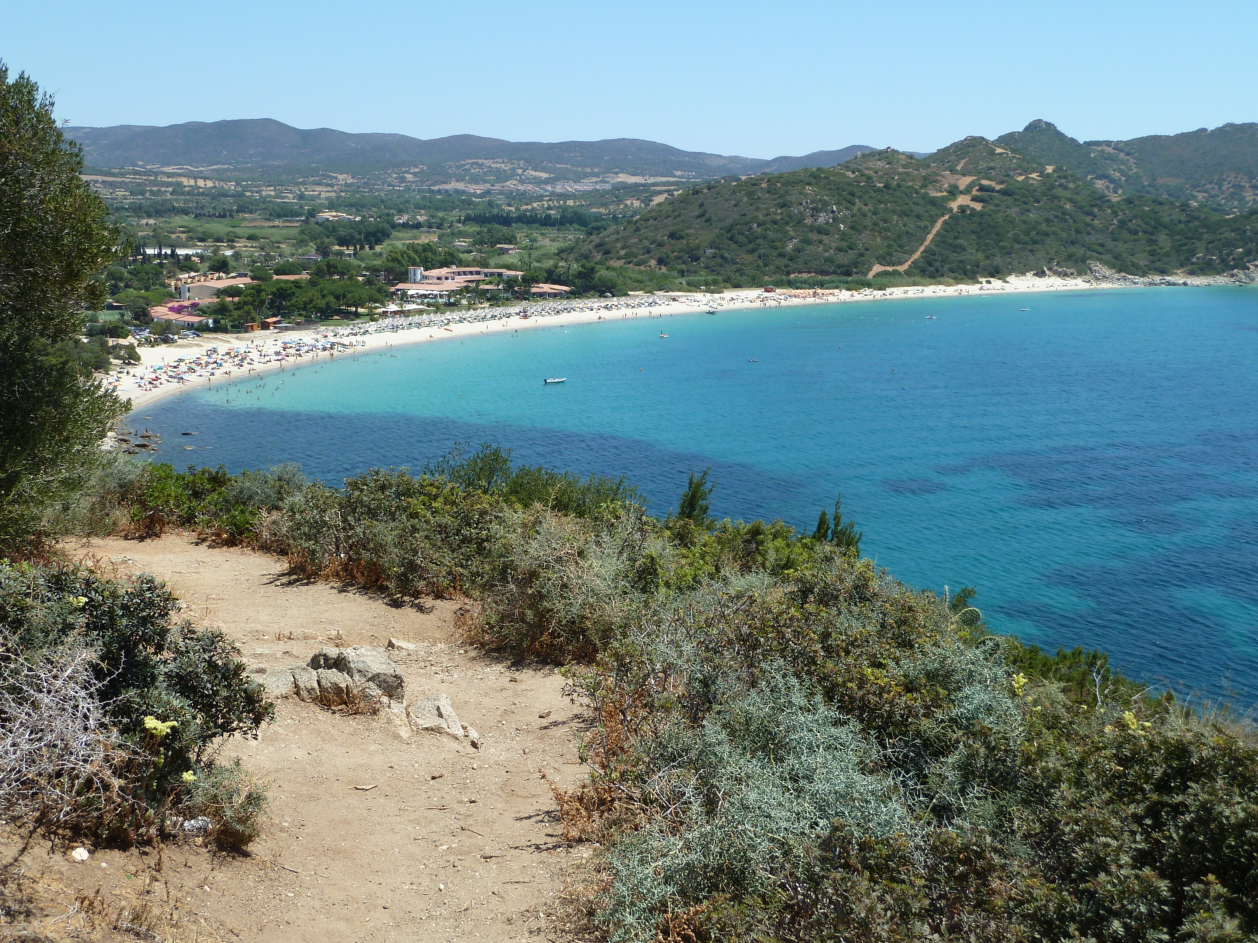 plage de campus